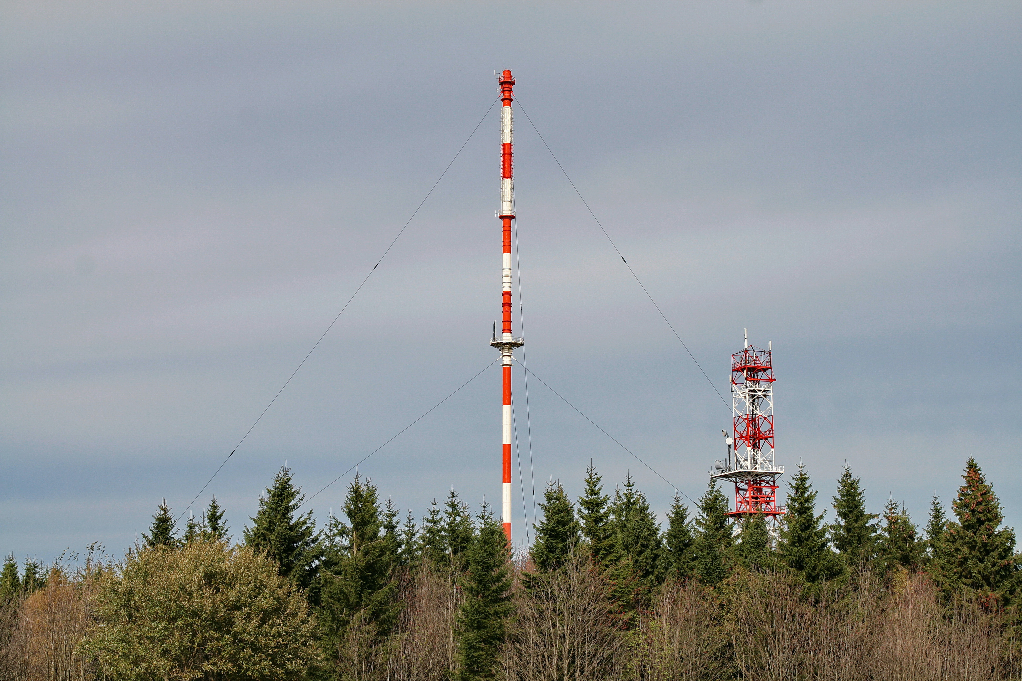 Torfhaus im Harz in Niedersachsen, Deutschland